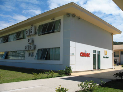 Prédio do Complexo de Ensino Superior de Santa Catarina (CESUSC)